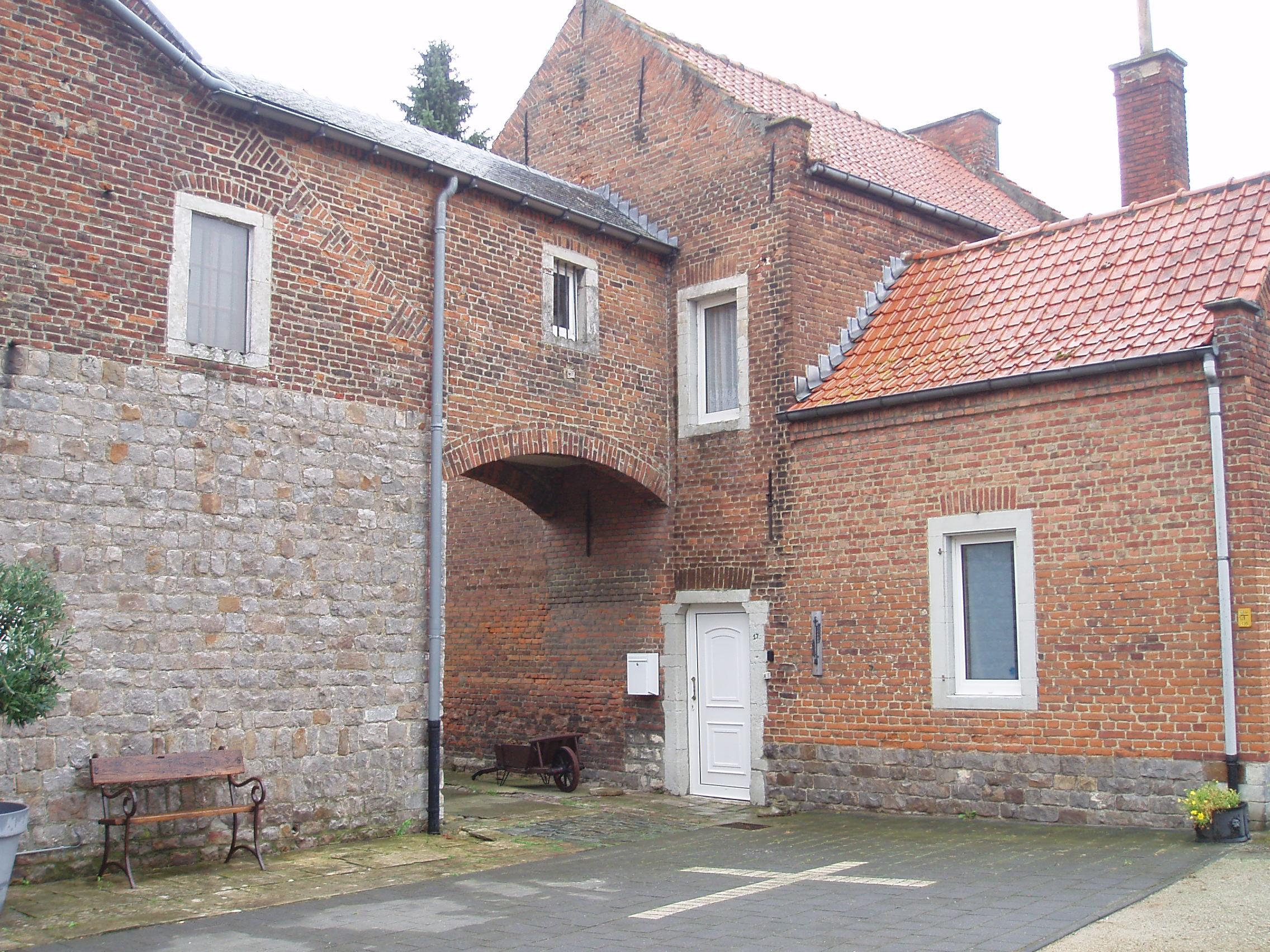 Onze-Lieve-Vrouw ten Steenkapel